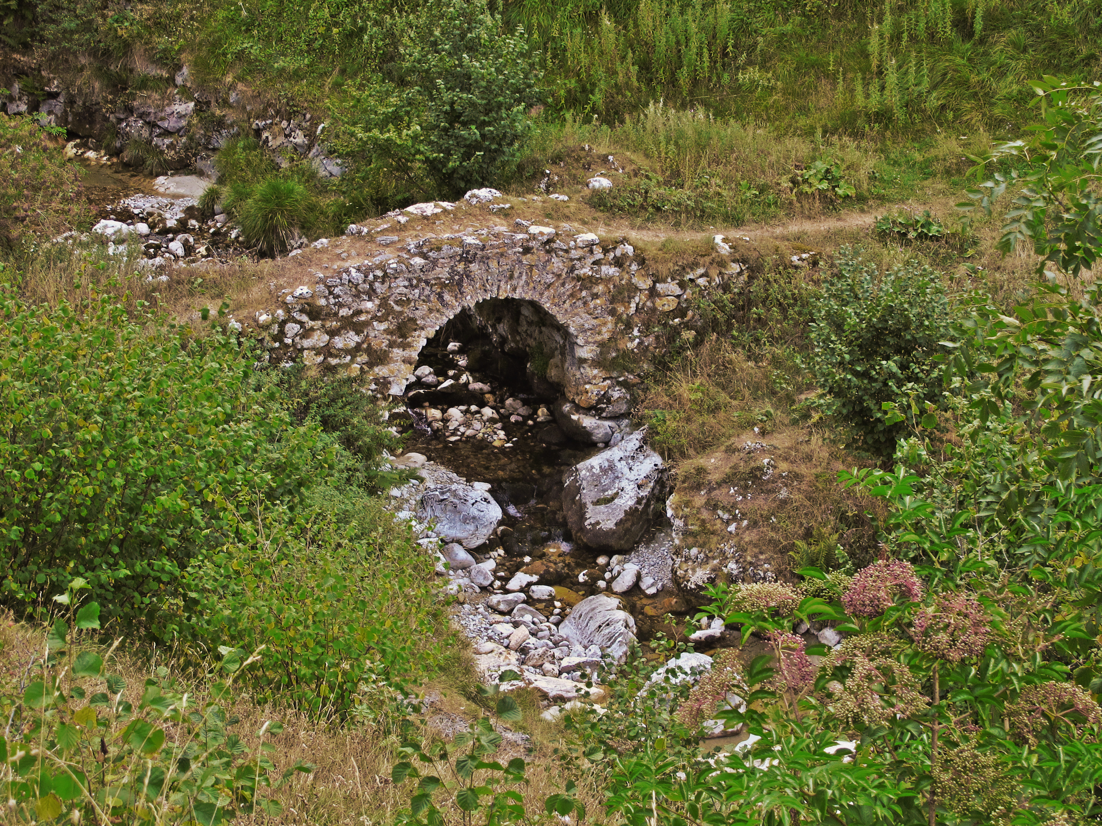 Los Invernales del Texu son un grupo de edificaciones situadas en los Picos de Europa, en Asturias, en el concejo de Cabrales. Es un punto de paso en la Ruta de la Reconquista. Los invernales son refugios o cabañas realizados por los pastores para guardar en épocas invernales el ganado. Allí podemos encontrar un puente prerromano por el que podemos pasar para atravesar el río Duje.